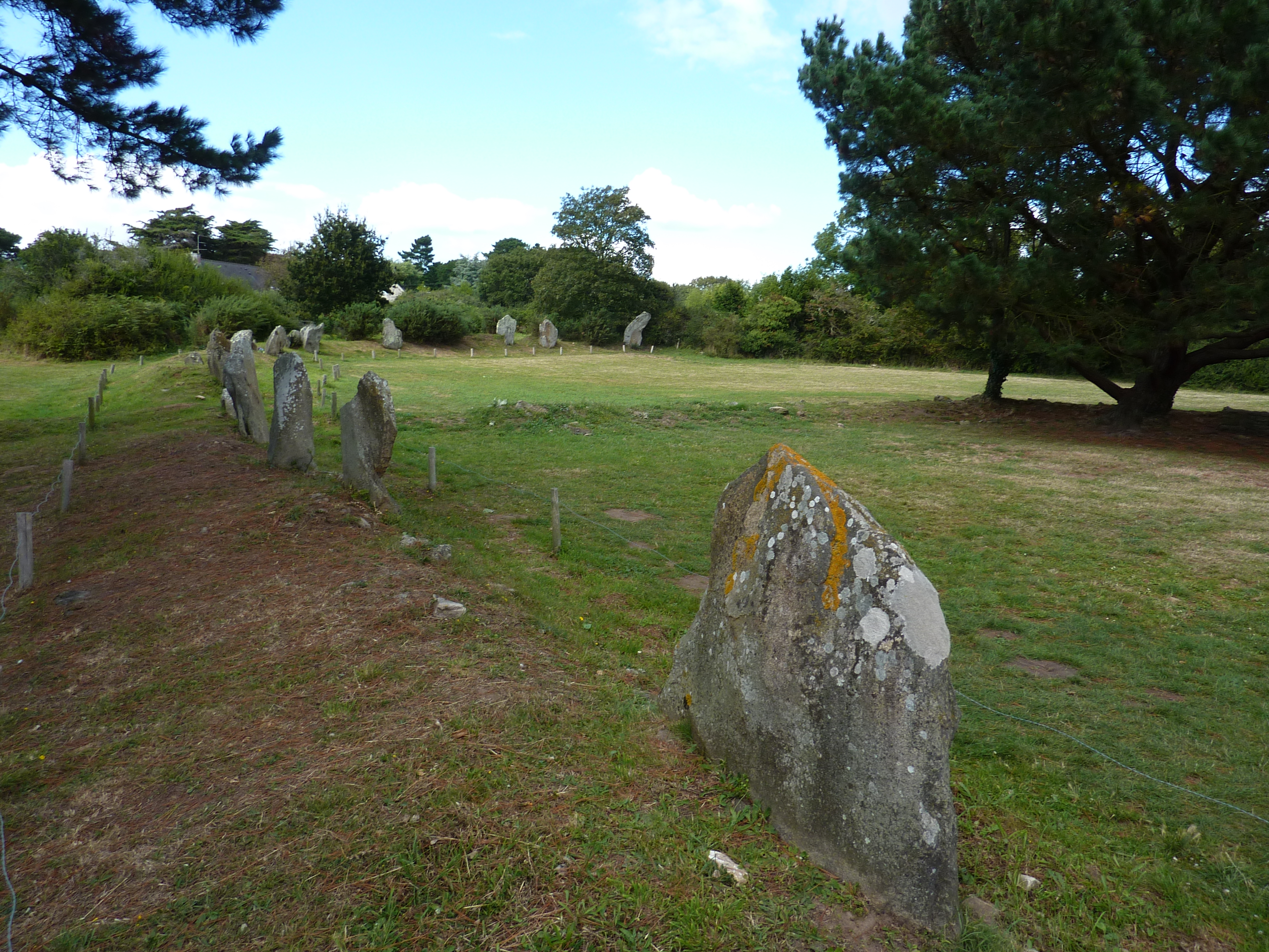 Cromlech (enceinte mégalithique) de Kergonan, Ile-aux-Moines, France .